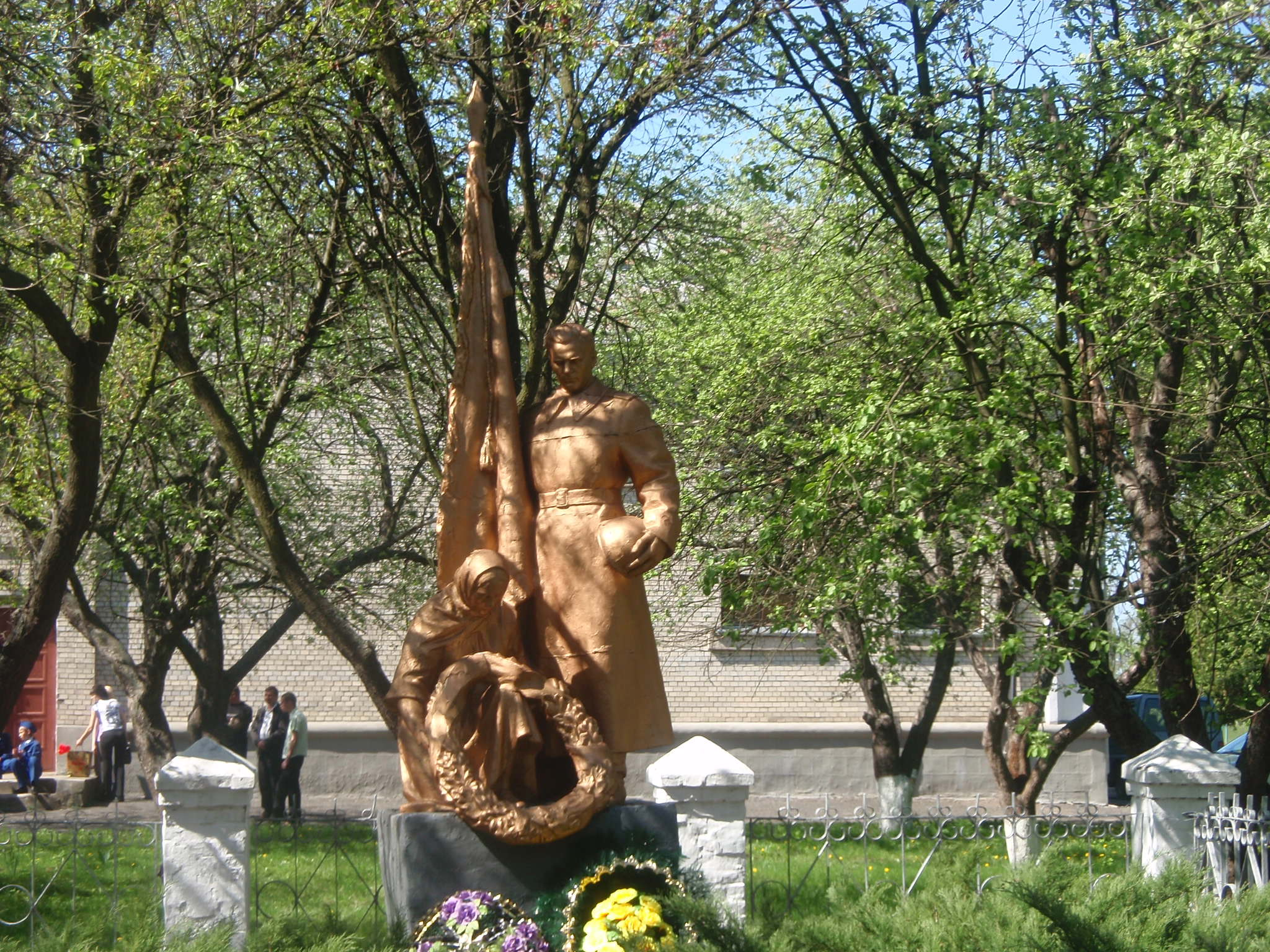 Пам'ятник воїнам-односельцям, Сигнаївка